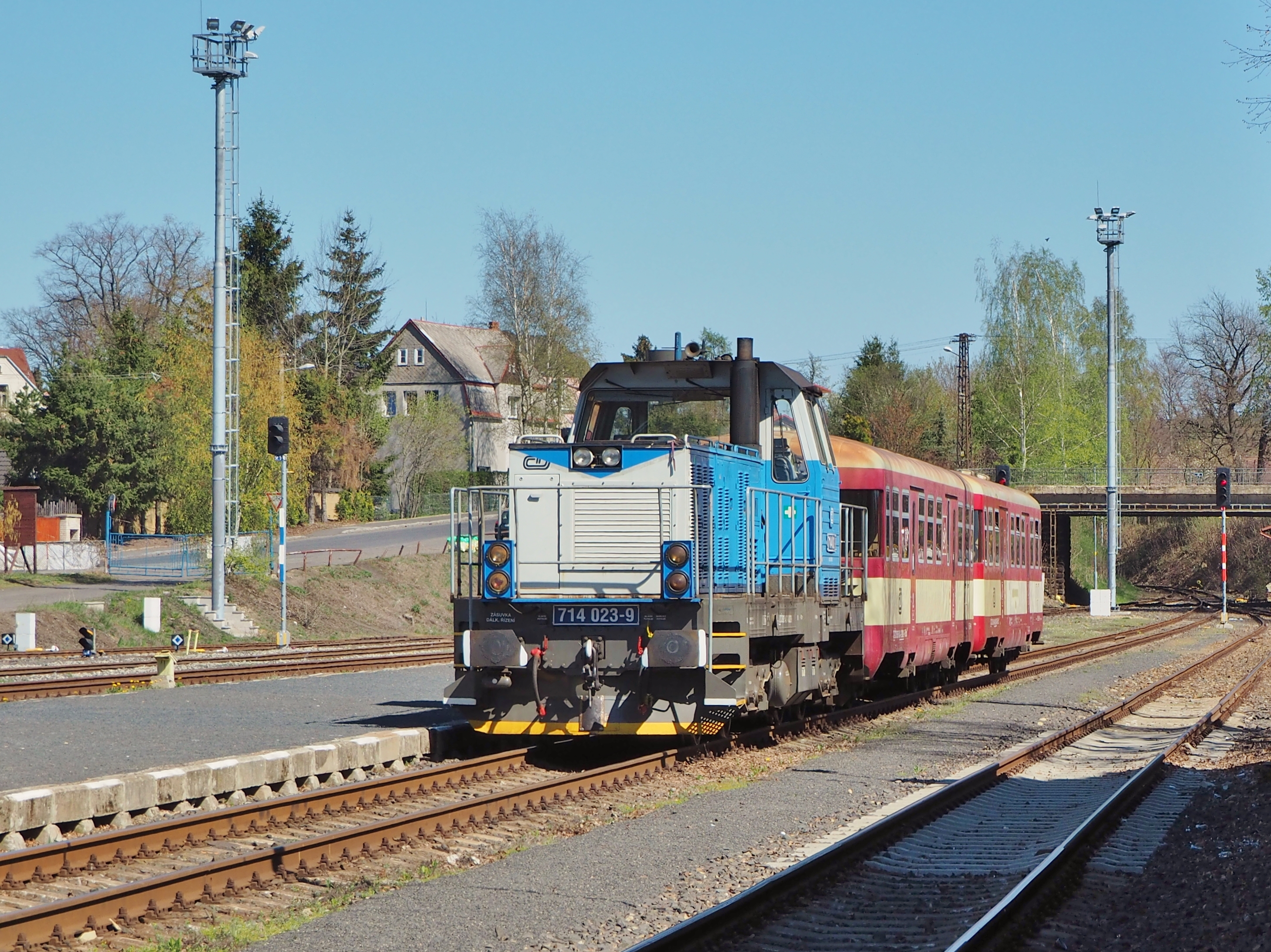 linka T2 DÚK, Brtnický cyklovlak, lokomotiva 714, 714.023